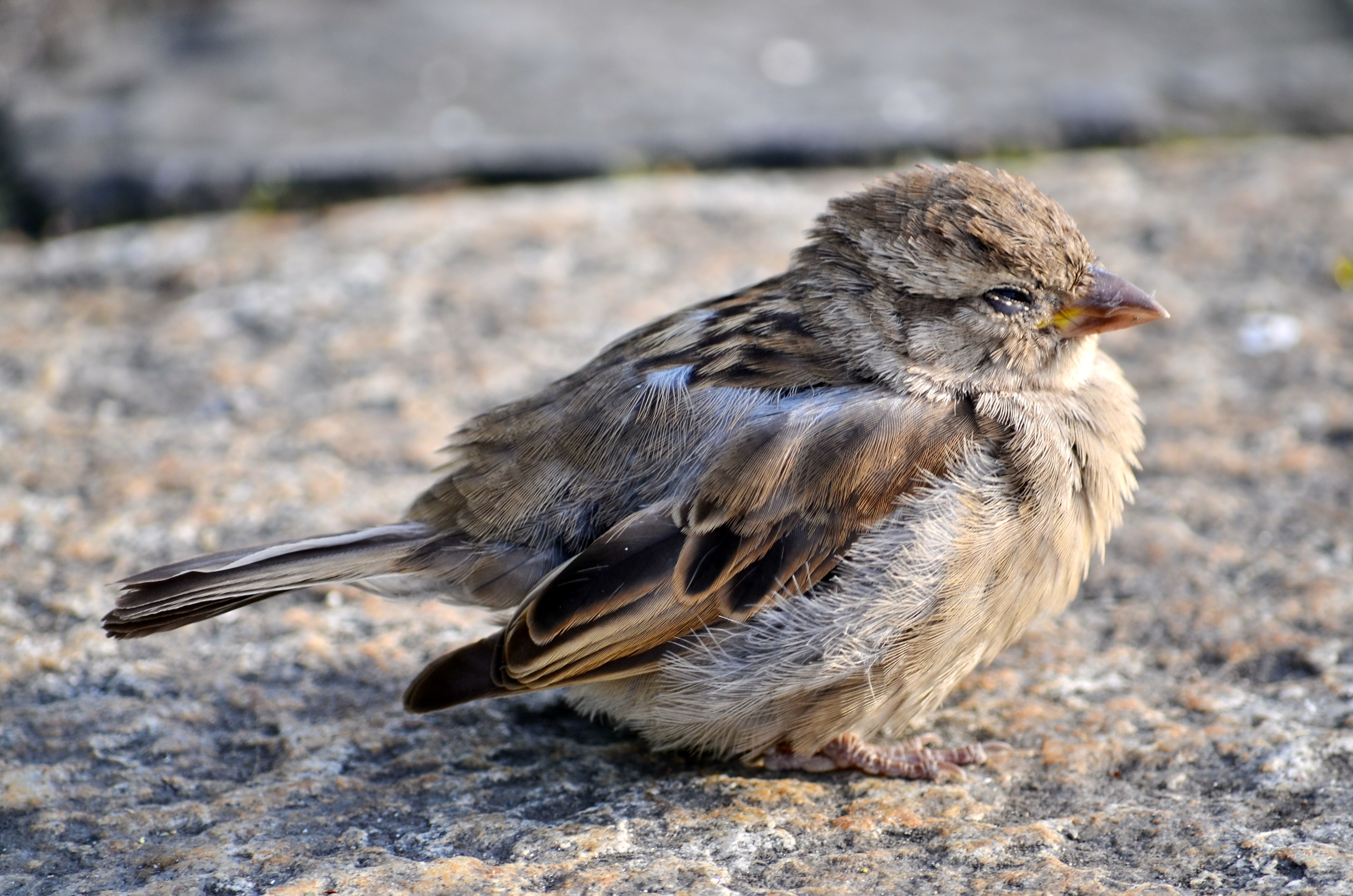 Passer domesticus, Alpenquai in Zürich (Switzerland)